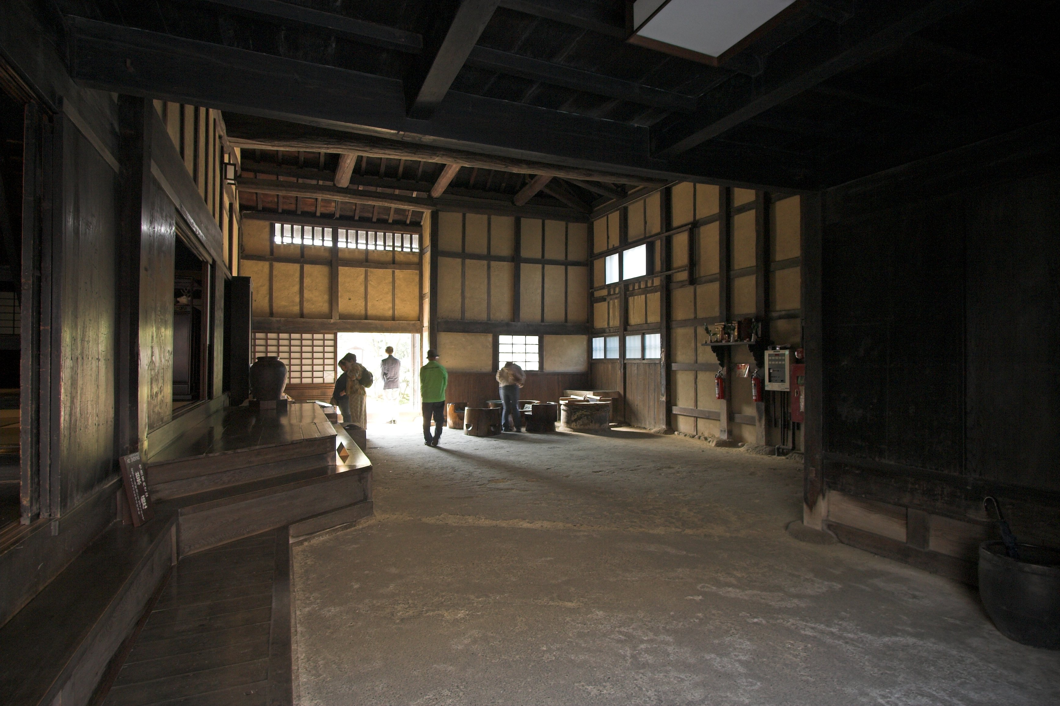 今西家住宅(奈良県橿原市, Japan)